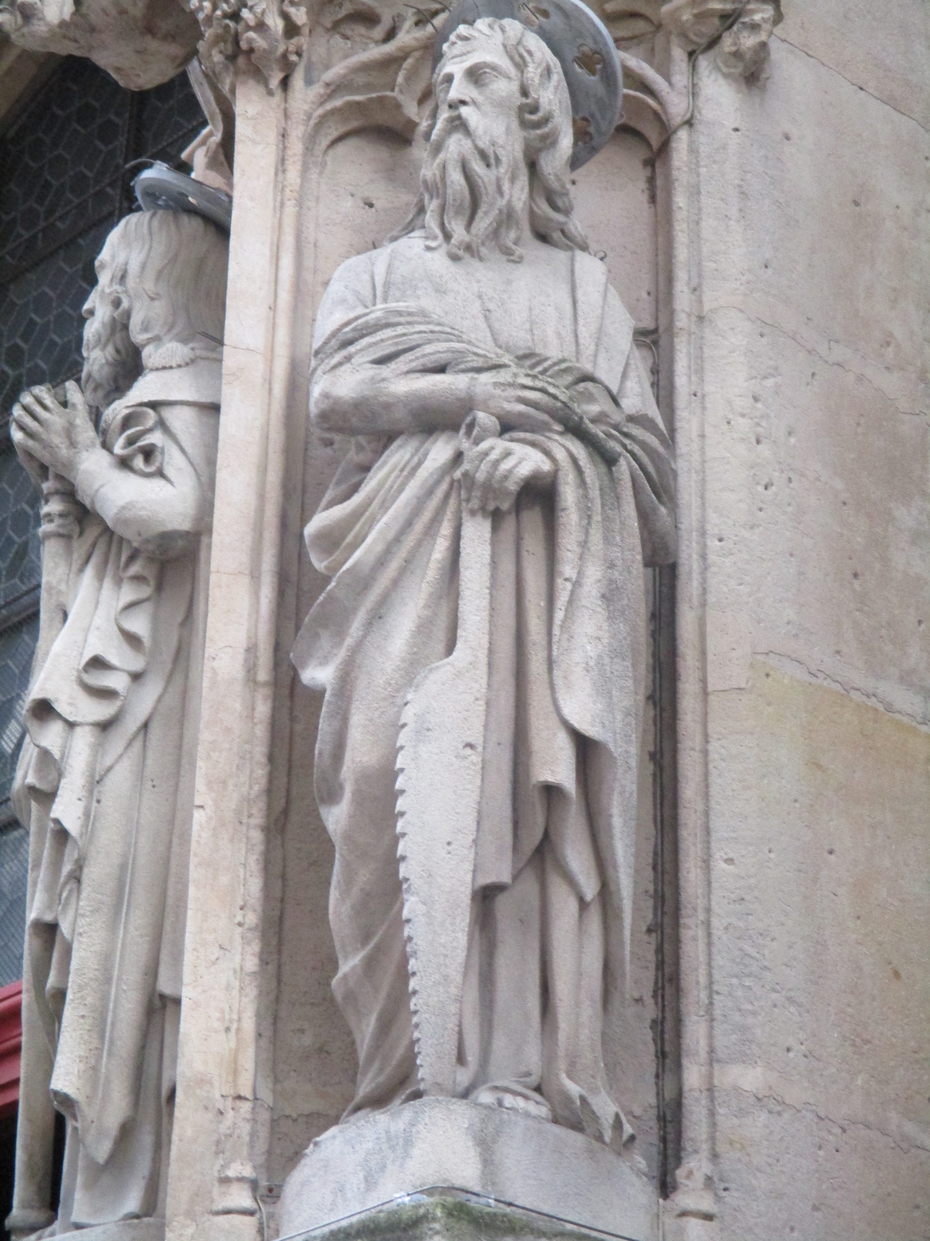 Statue (milieu XIXe) du portail ogival de l'église Saint-Merri de Paris ː l'apôtre Simon le Zélote.